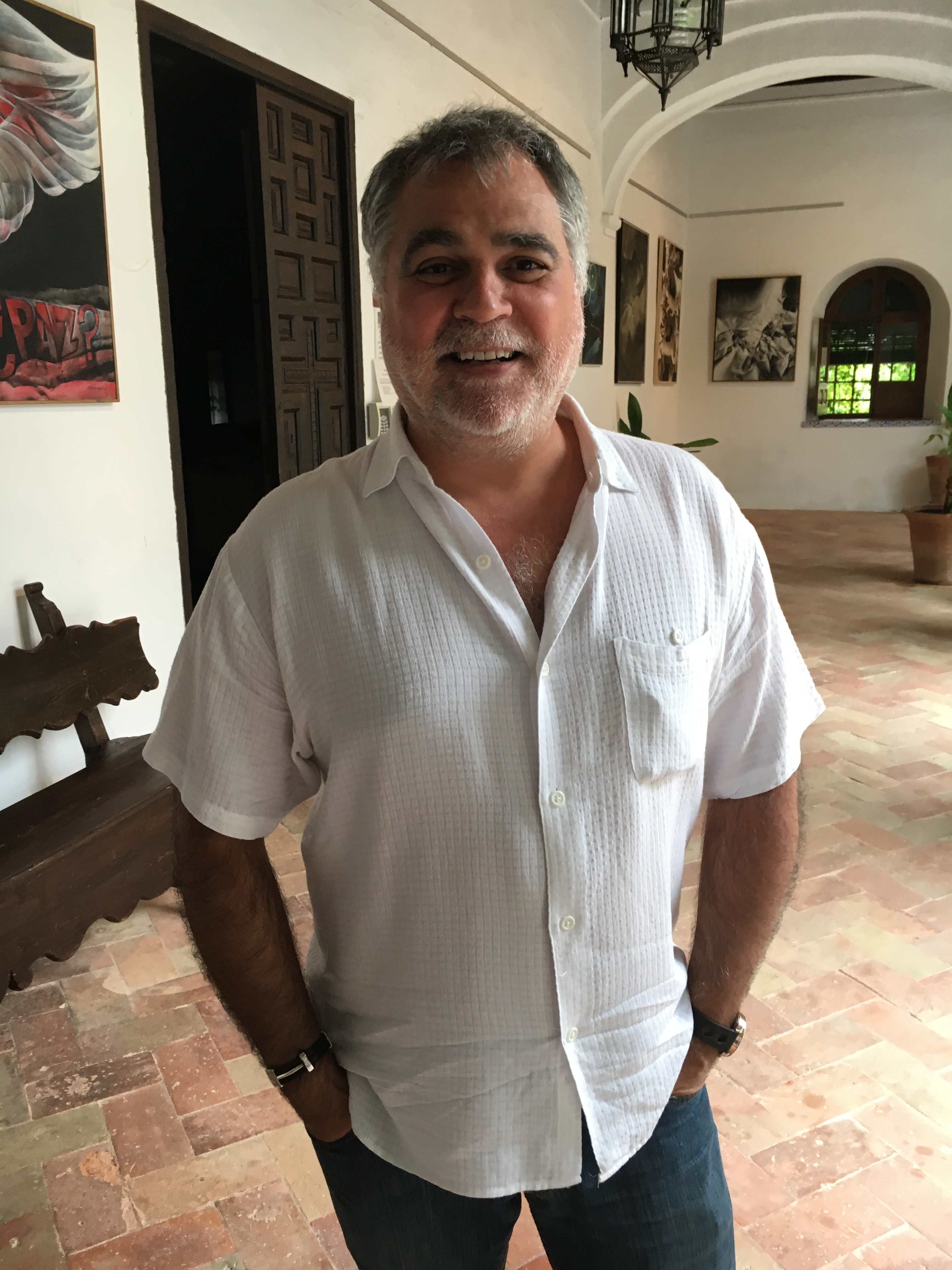 Zambrano en la Escuela de Verano Pablo Olavide Carmona 2016